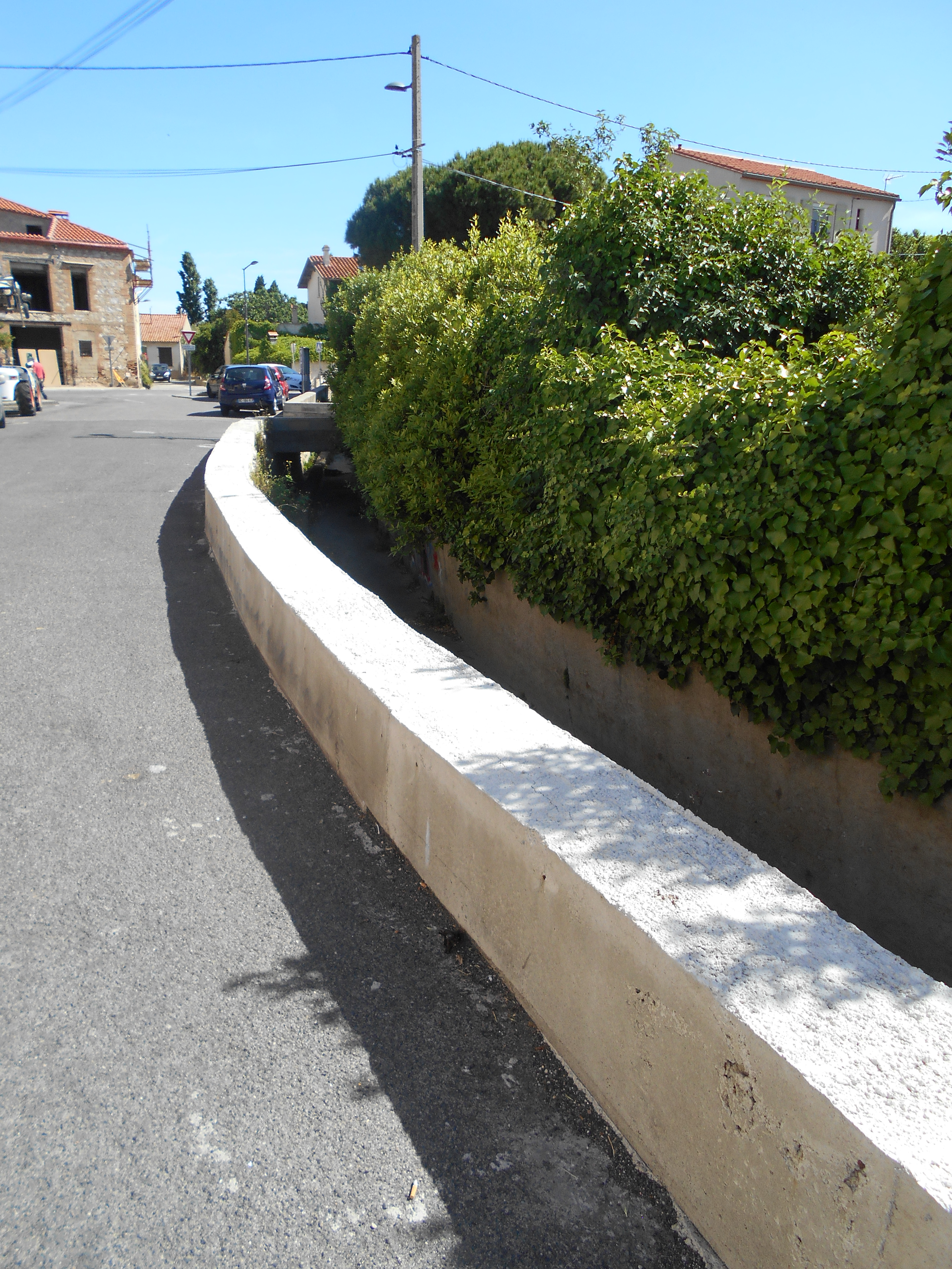 L'Agulla Ventosa, de Sant Hipòlit de la Salanca